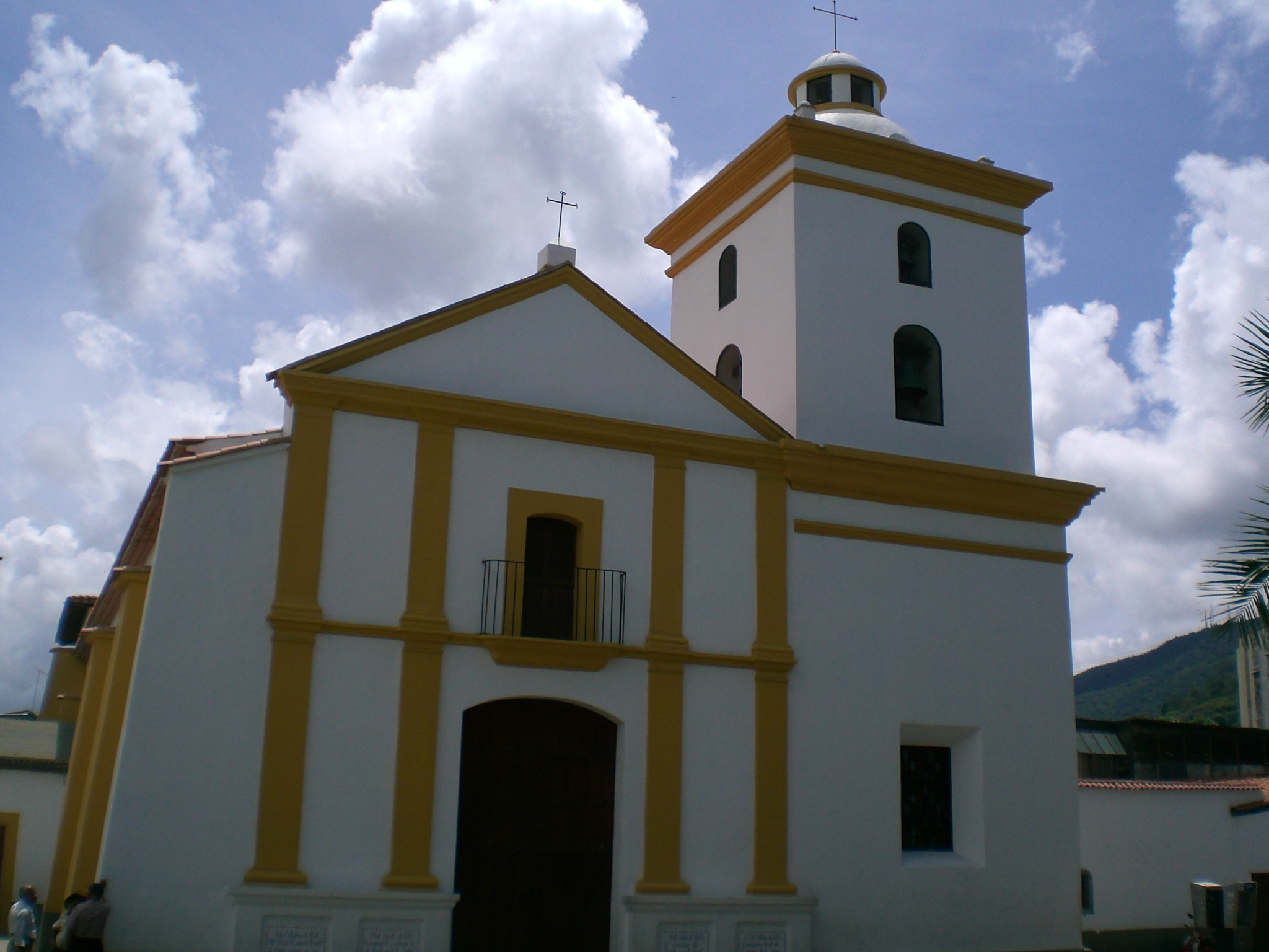 Nuestra Señora del Rosario Church, Baruta Municipality, Caracas, Venezuela